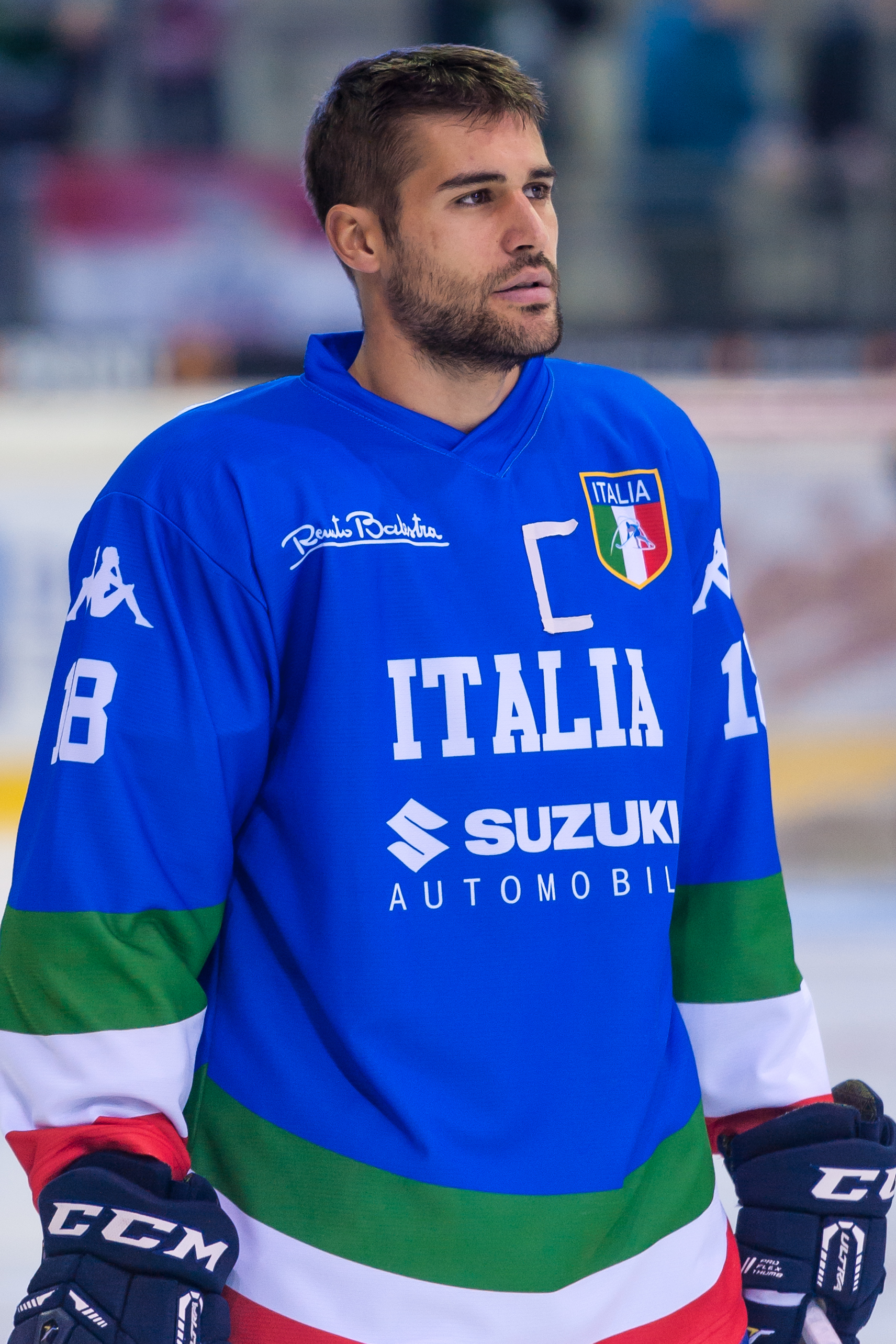 Freundschaftliches Eishockey-Länderspiel - Österreich vs Italien. Bild zeigt Anton Bernard (ITA).